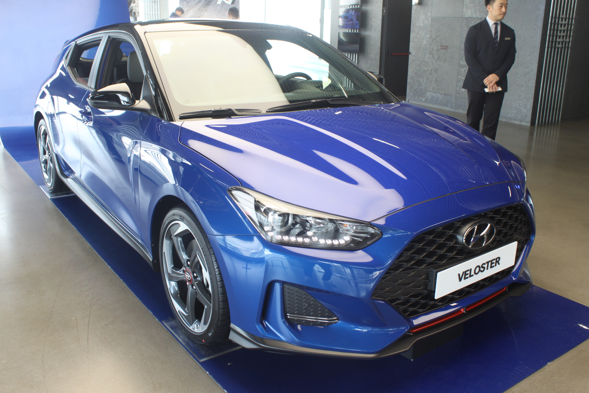 현대 벨로스터 2세대 정측면